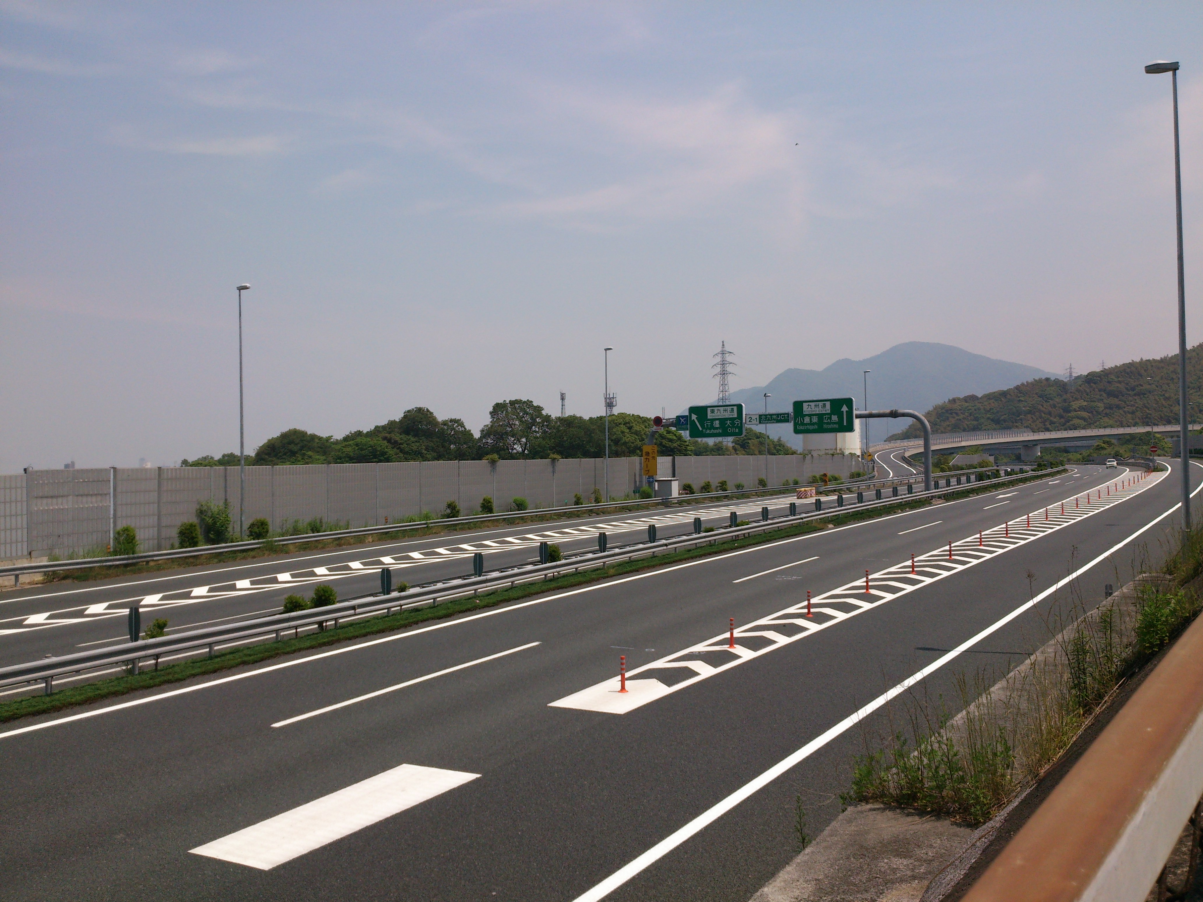 九州自動車道にある北九州JCTの画像